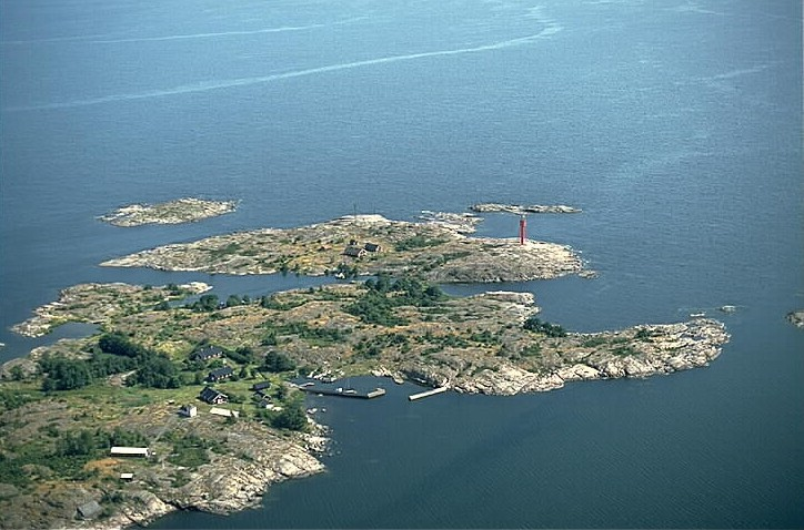 Motiv: Häradskär Nyckelord: Flygbilder, Riksintressen Kategori: Fyrplats Häradskär